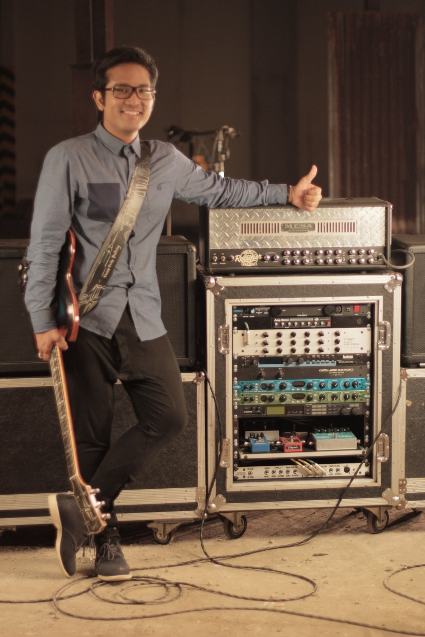 Irfan Aulia dengan rig gitar kesayangannya.